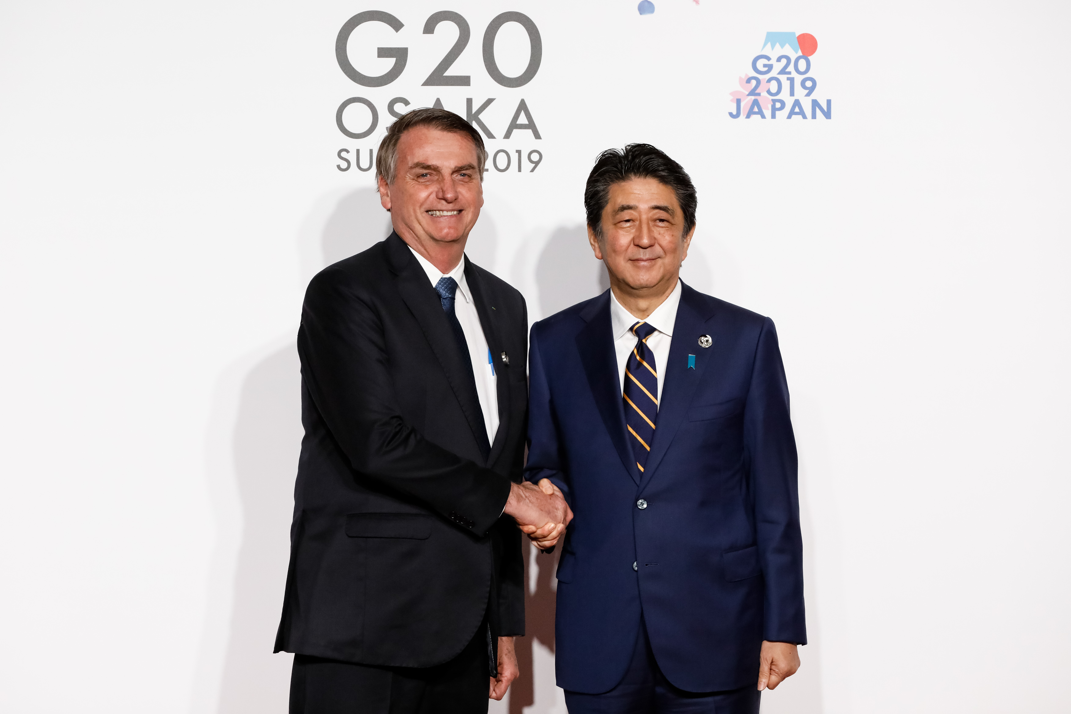 (Osaka - Japão, 28/06/2019) Presidente da República, Jair Bolsonaro, durante cumprimentos do Primeiro Ministro Shinzo Abe. Foto: Alan Santos/PR